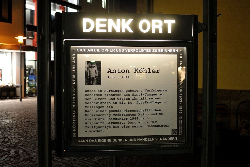 "Denk Ort" in Nürtingen mit Erinnerung an den ermordeten Sinti-Jungen Anton Köhler